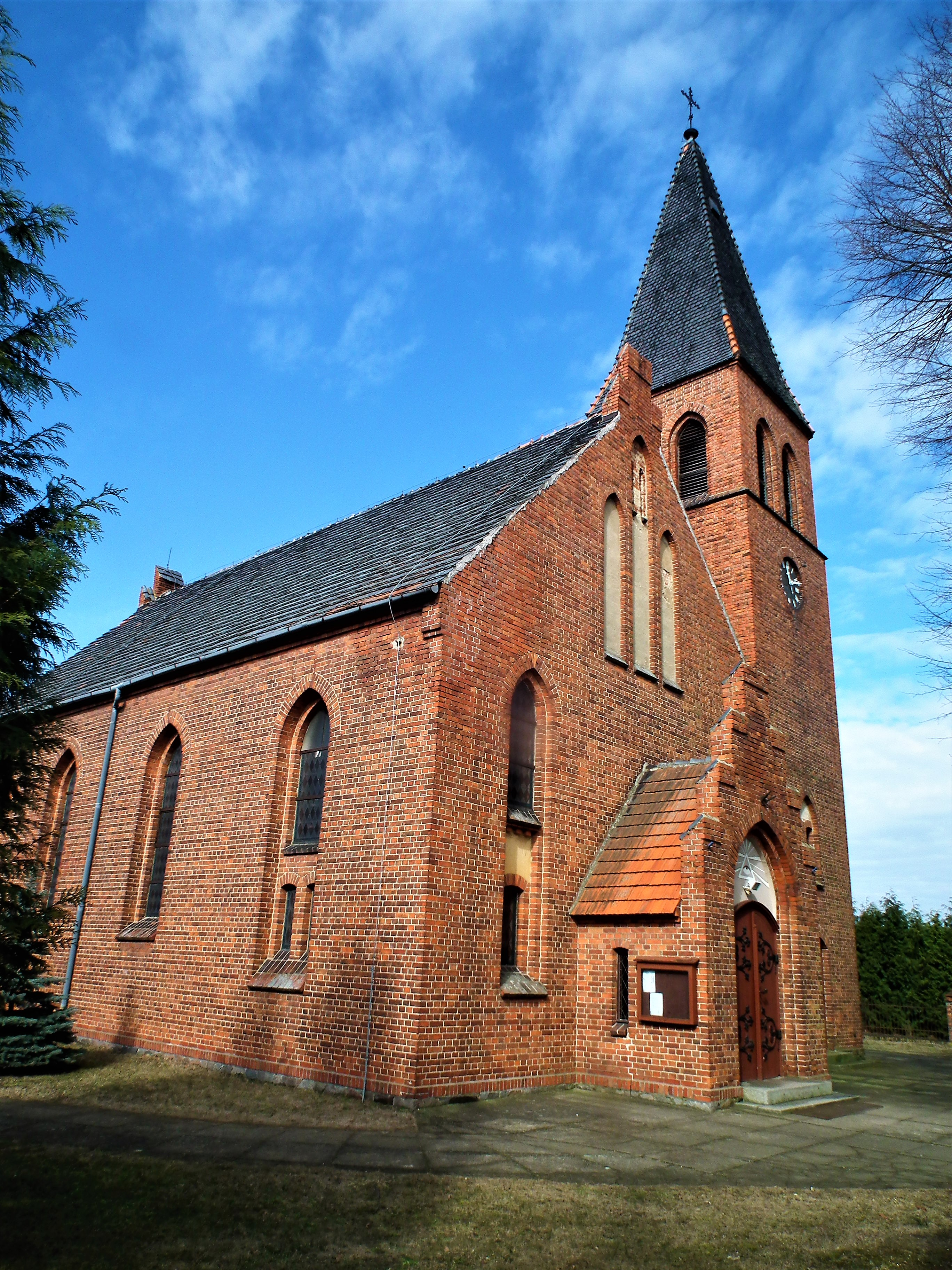 Kościół Królowej Korony Polskiej w Kotuszu.